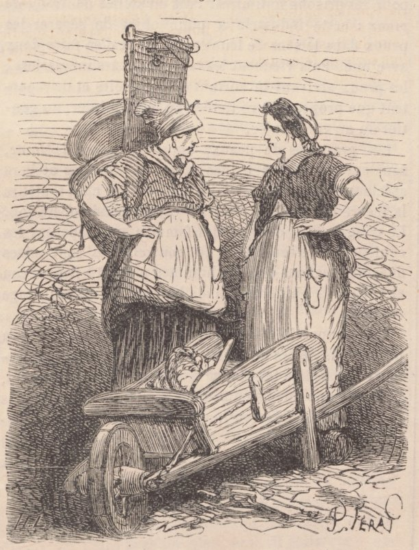 Types de blanchisseuses parisiennes.